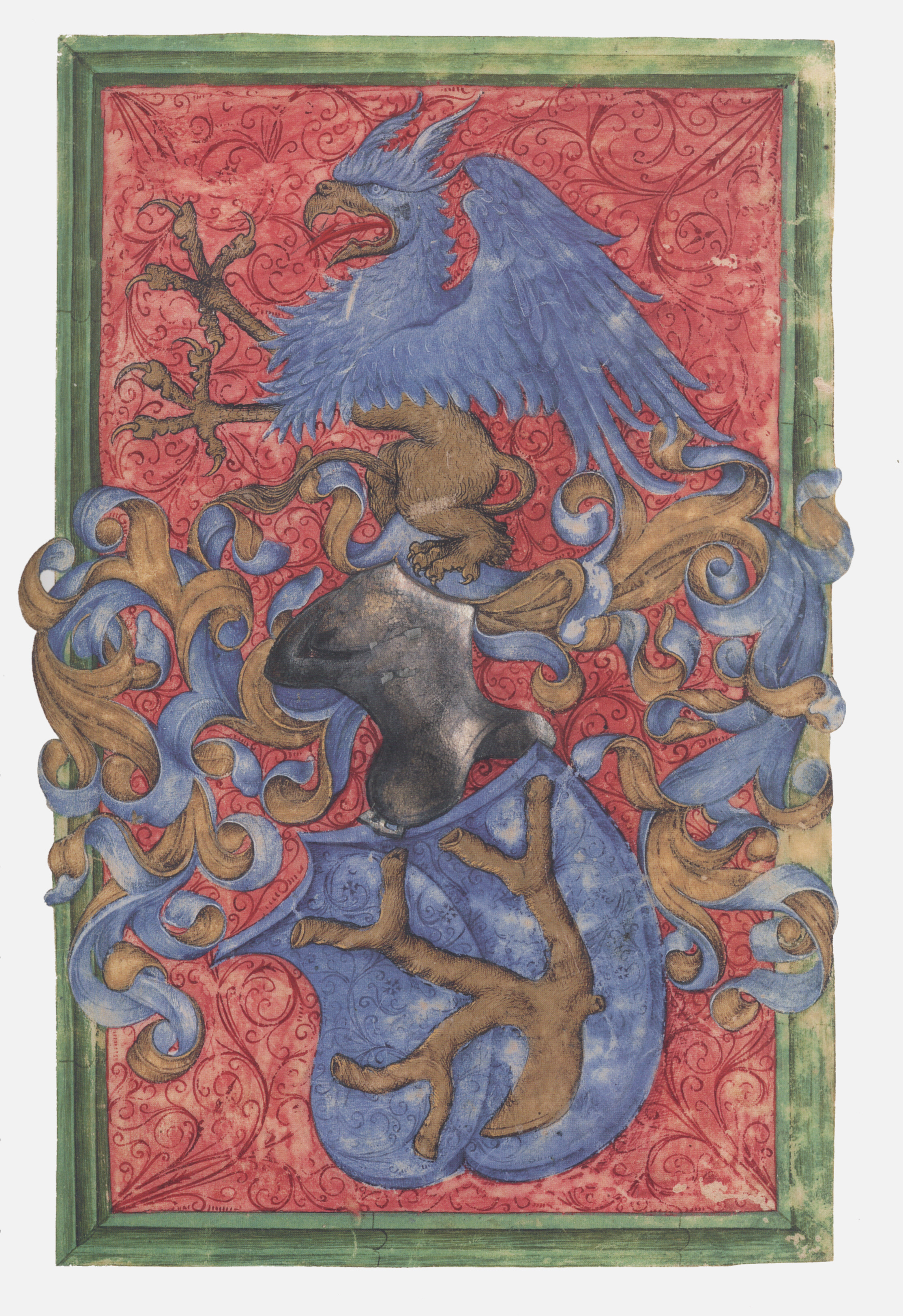 Mittelalterliches Hausbuch von Schloss Wolfegg Fol. 2r: Wappendarstellung des unbekannten Auftraggebers siehe auch fol. 34v: Image:Hausbuch_Wolfegg_34v_Wappen.jpg